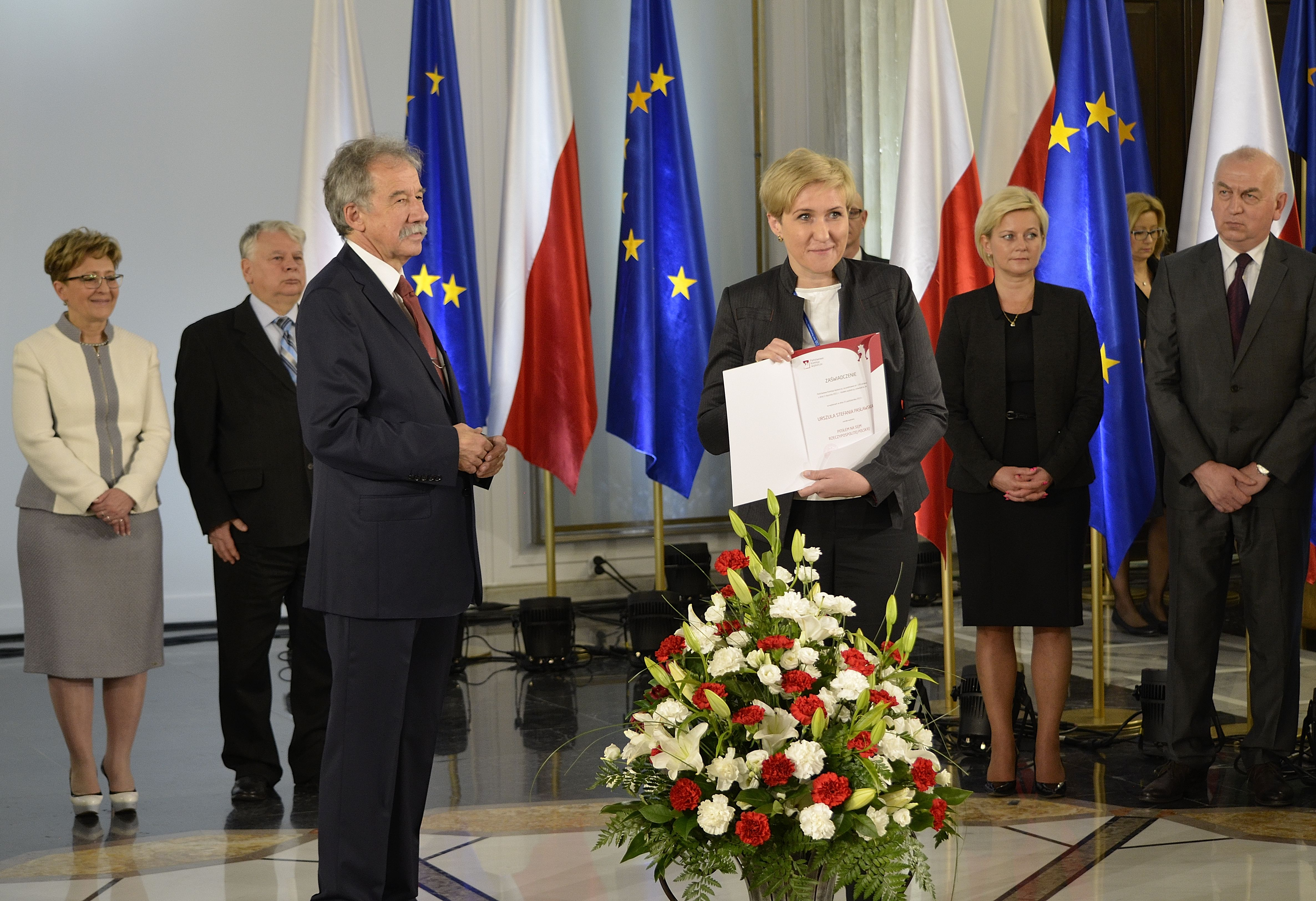 Posłanka Urszula Pasławska podczas uroczystości wręczenia zaświadczeń o wyborze nowo wybranym posłom w Sali Kolumnowej Sejmu